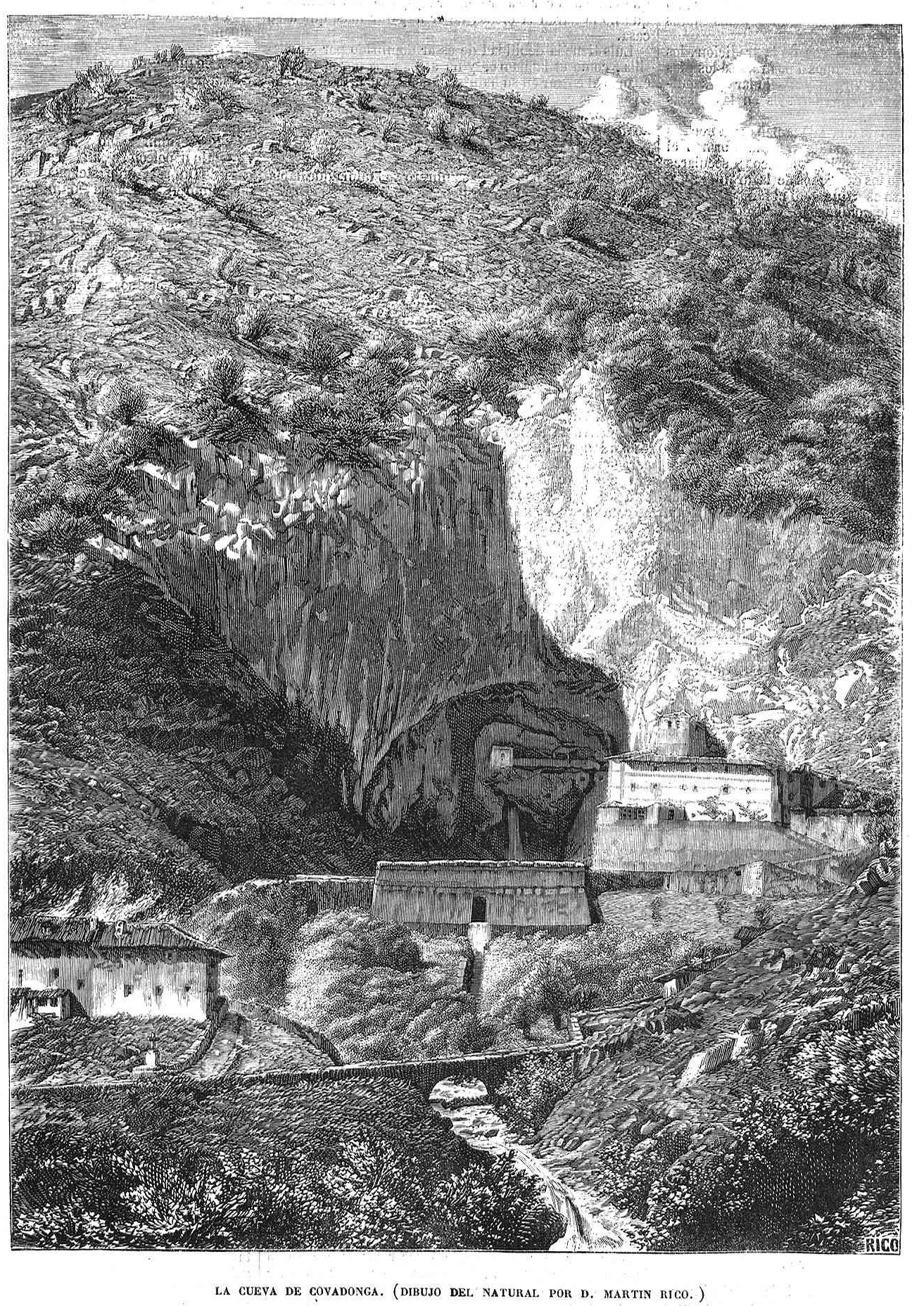 La cueva de Covadonga, dibujo del natural de Martín Rico, en la revista española El Museo Universal.